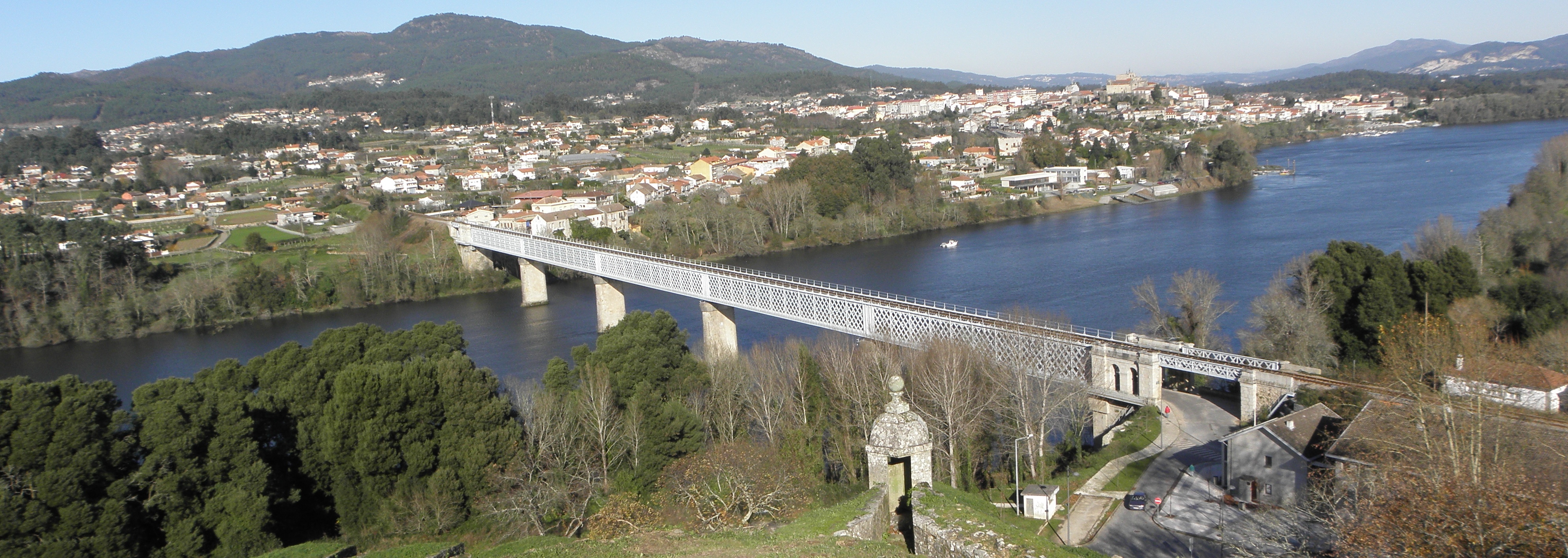 A Ponte Vella Internacional Tui-Valença, entre España e Portugal está destinada ó tránsito de peóns, vehículos e do ferrocarril.